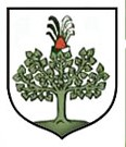 wappen Pobiedna